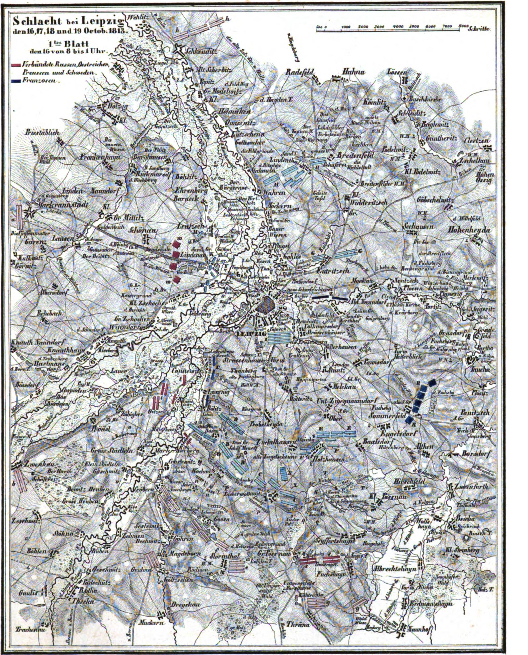 Position des troupes français et coalisées lors du premier jour de la bataille de Leipzig, le 16 octobre 1813, entre 8h et 13h